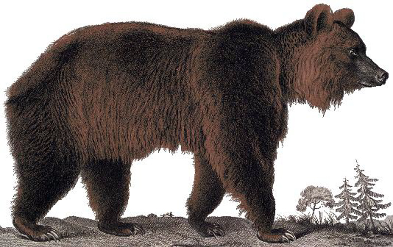 Ursus arctos. L'ours brun (sixième de la grandeur) / peint sur vélin par Maréchal, gravé par Miger. [Cote : d11277] [Illustrations de La Ménagerie du Muséum National d'Histoire Naturelle], pl.12 / Maréchal, Huet, Wailly, dess. Publication Paris : chez Miger, 1808 Description 41 est. : noir et blanc Notes: Dans"La Ménagerie du Muséum National d'Histoire Naturelle"/ G. Cuvier et Lacépède, aut.du texte, Paris, chez Miger, 1808. L'ouvrage comprend 41 estampes, Muséum National d'Histoire Naturelle (Bibliothèque) Sujet(s): Mammifères Acq.: Museum National d'Histoire Naturelle Thème: Sciences de la nature Genre audiovisuel: Dessin d'animauxDessin